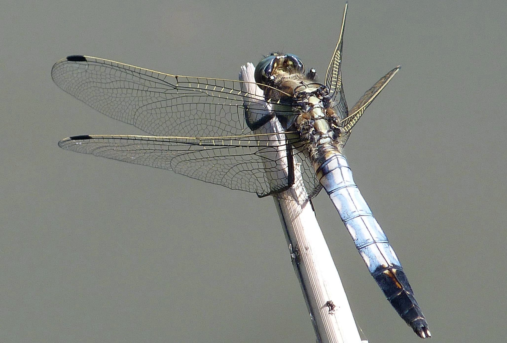 Rybniční soustava na Severní Moravě, Vážka bělořitná - Orthetrum albistylum